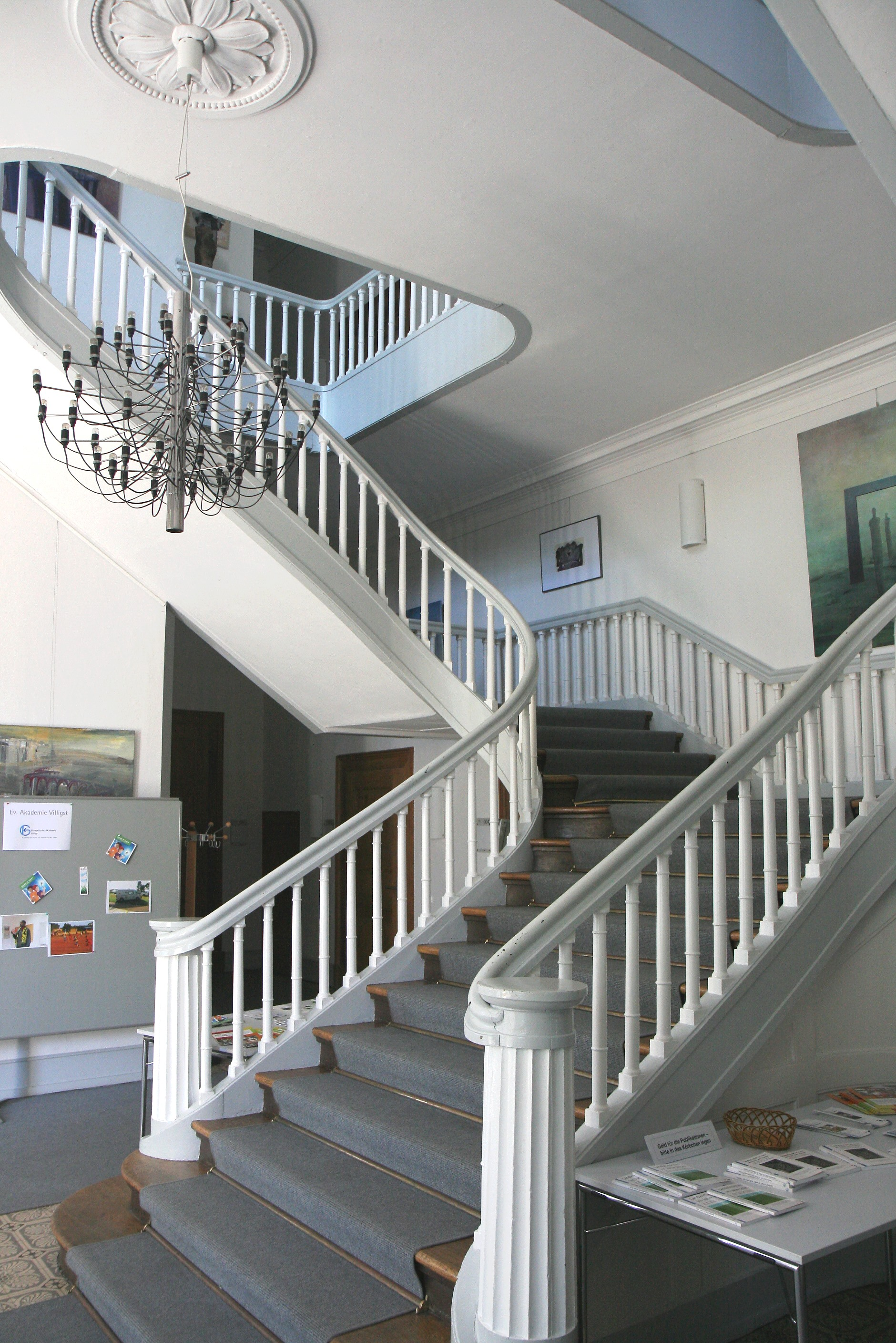 Haus Villigst in Schwerte, Iserlohner Straße 25. Treppenaufgang aus Holz im Haupthaus. This image shows a heritage building in Germany, located in the North Rhine-Westphalian city Schwerte (no. A100).